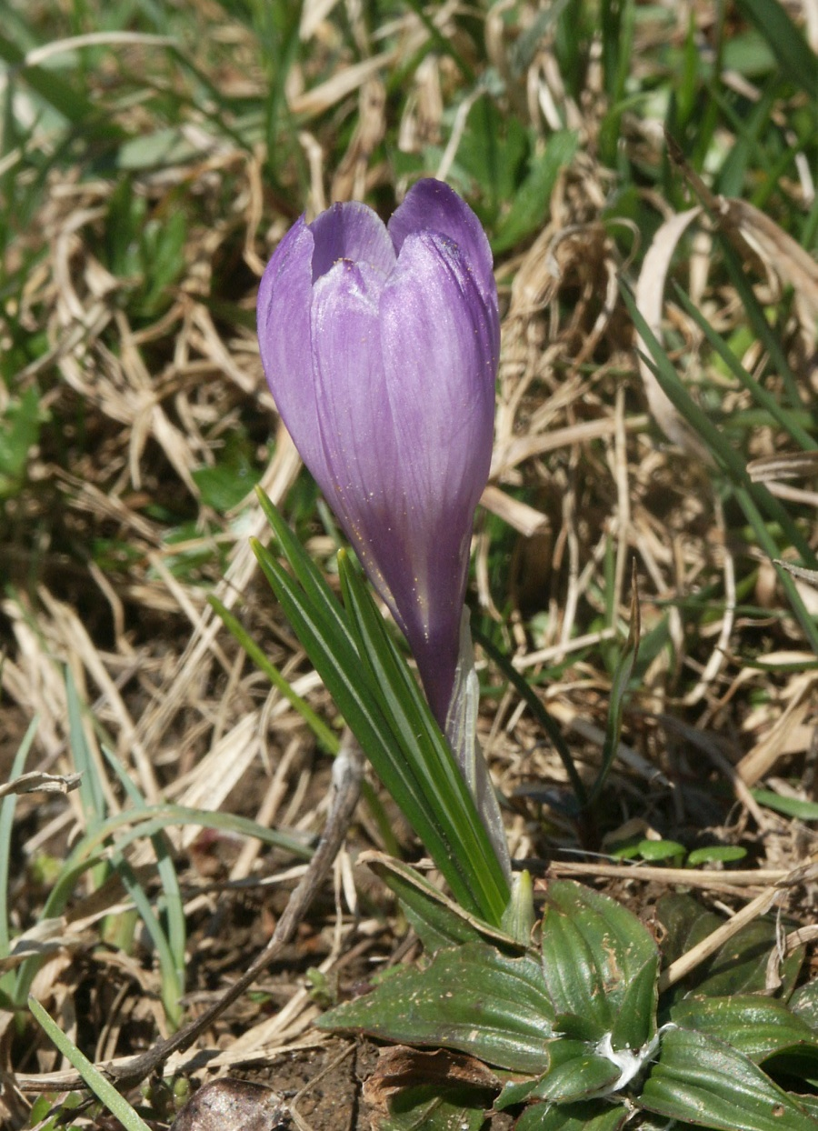 Crocus vernus subsp. albiflorus, Allgäuer Alpen, Germany